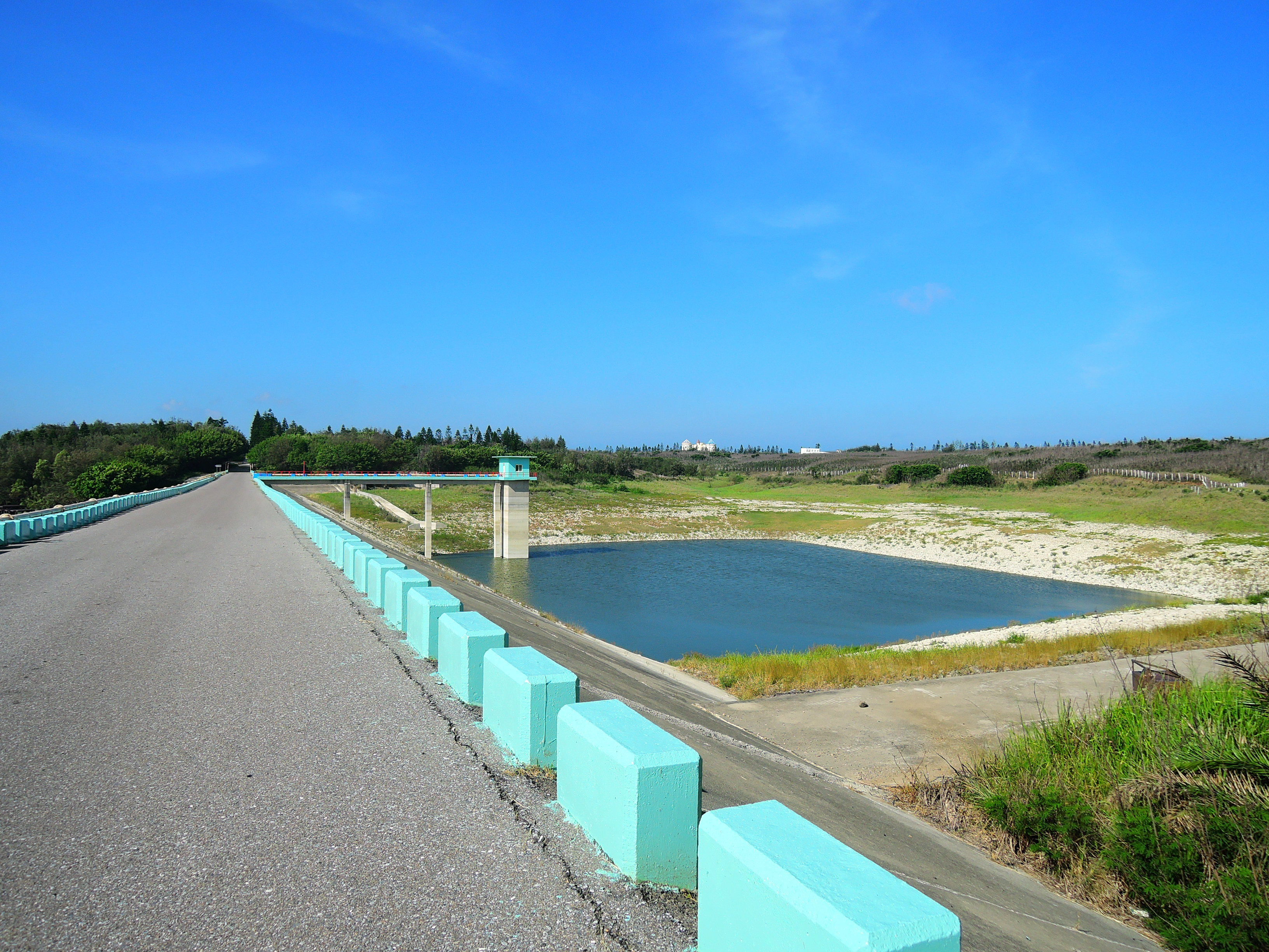 中文（台灣）: 臺灣西嶼鄉小池村水庫暨夢幻沙灘